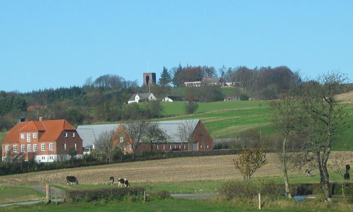 Ejer Baunehøj. Set fra motorvejen. 2004